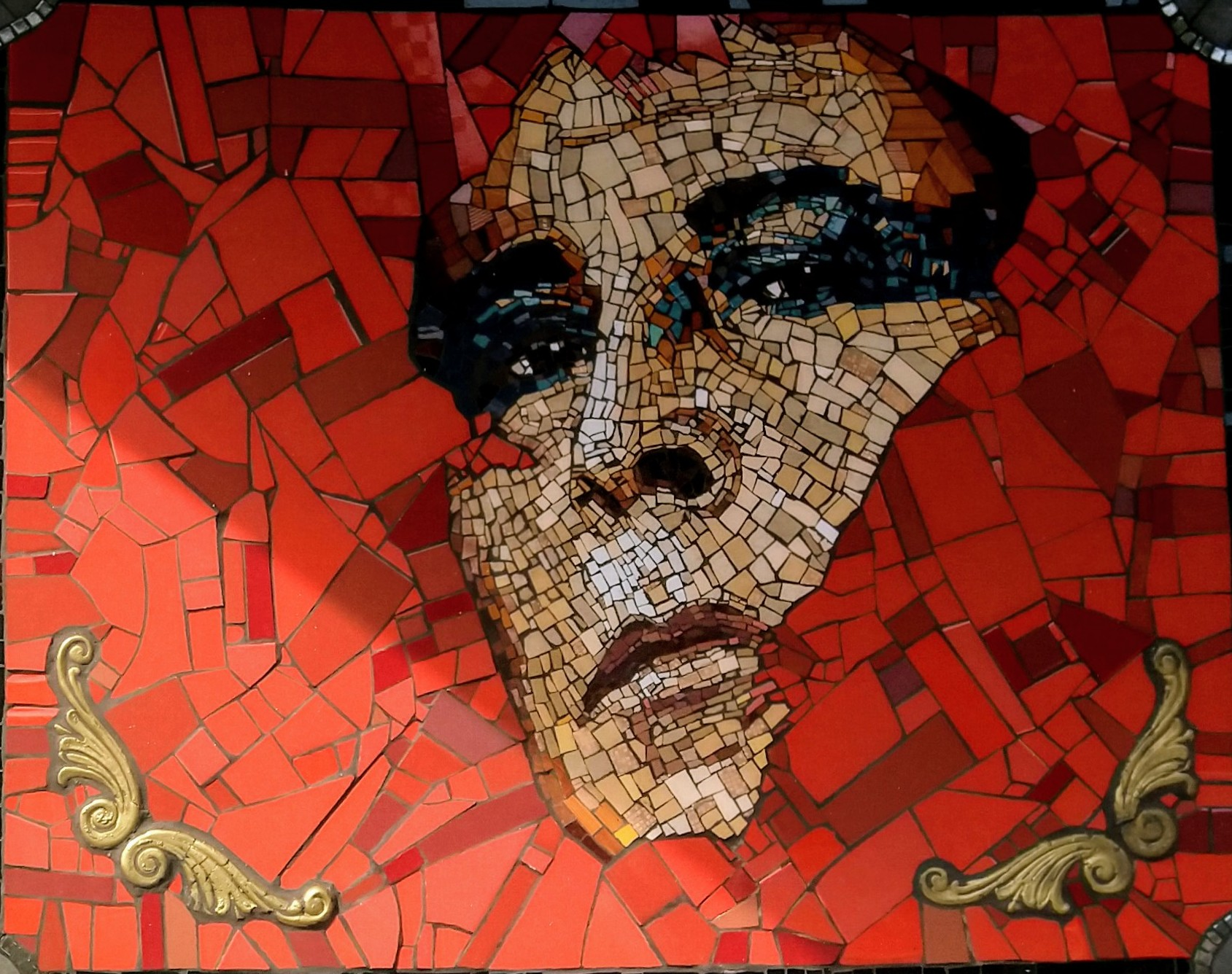 Mosaico/retrato de Pedro Lemebel. En la esquina de Tarapacá con Nataniel Cox, Estación de Metro Moneda.